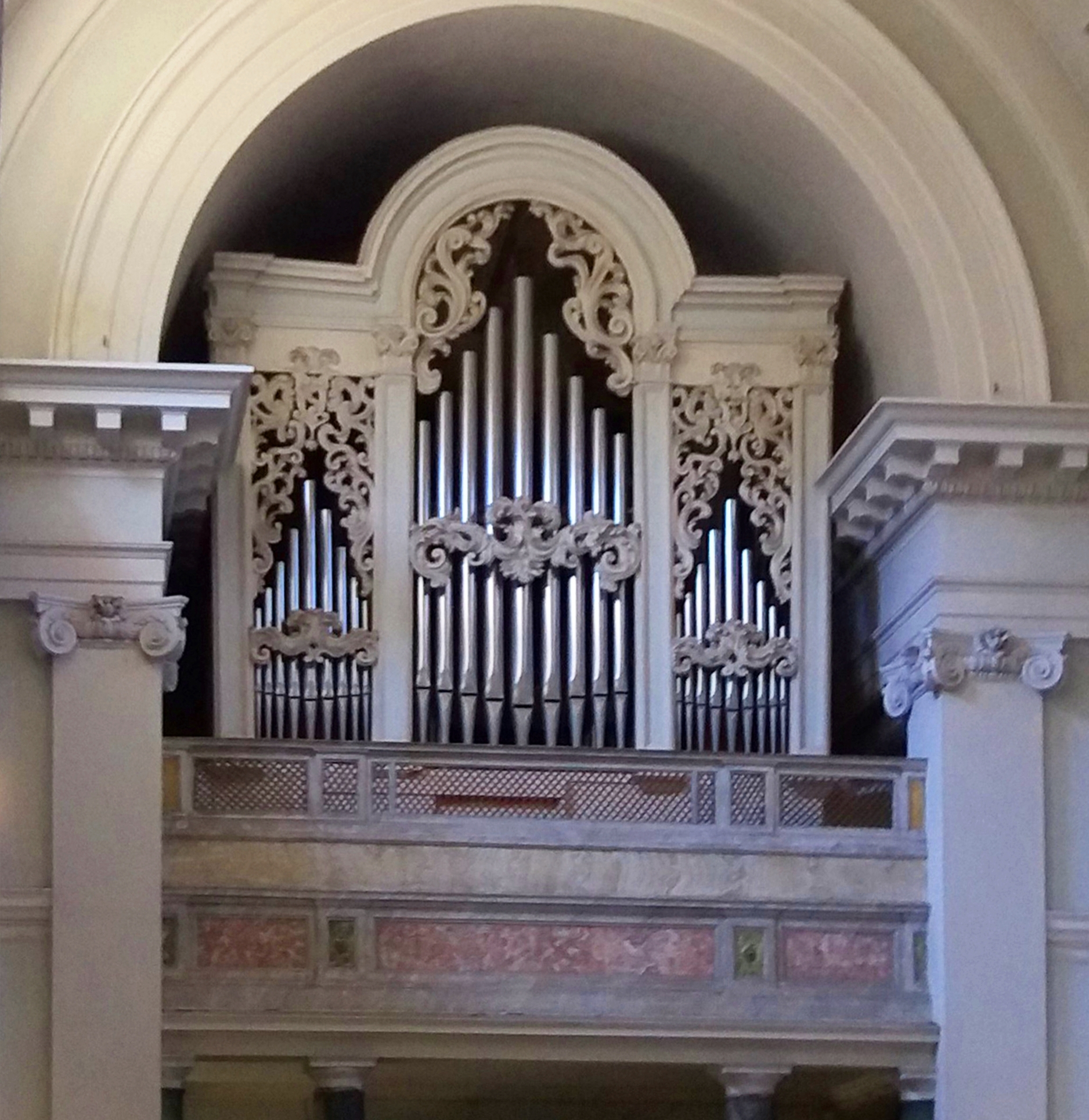 Il corpo in controfacciata, entro cassa antica su cantoria, dell'organo a canne Mascioni opus 953 (III+P/45) della cattedrale di Santa Scolastica a Subiaco. Versione ritagliata del file